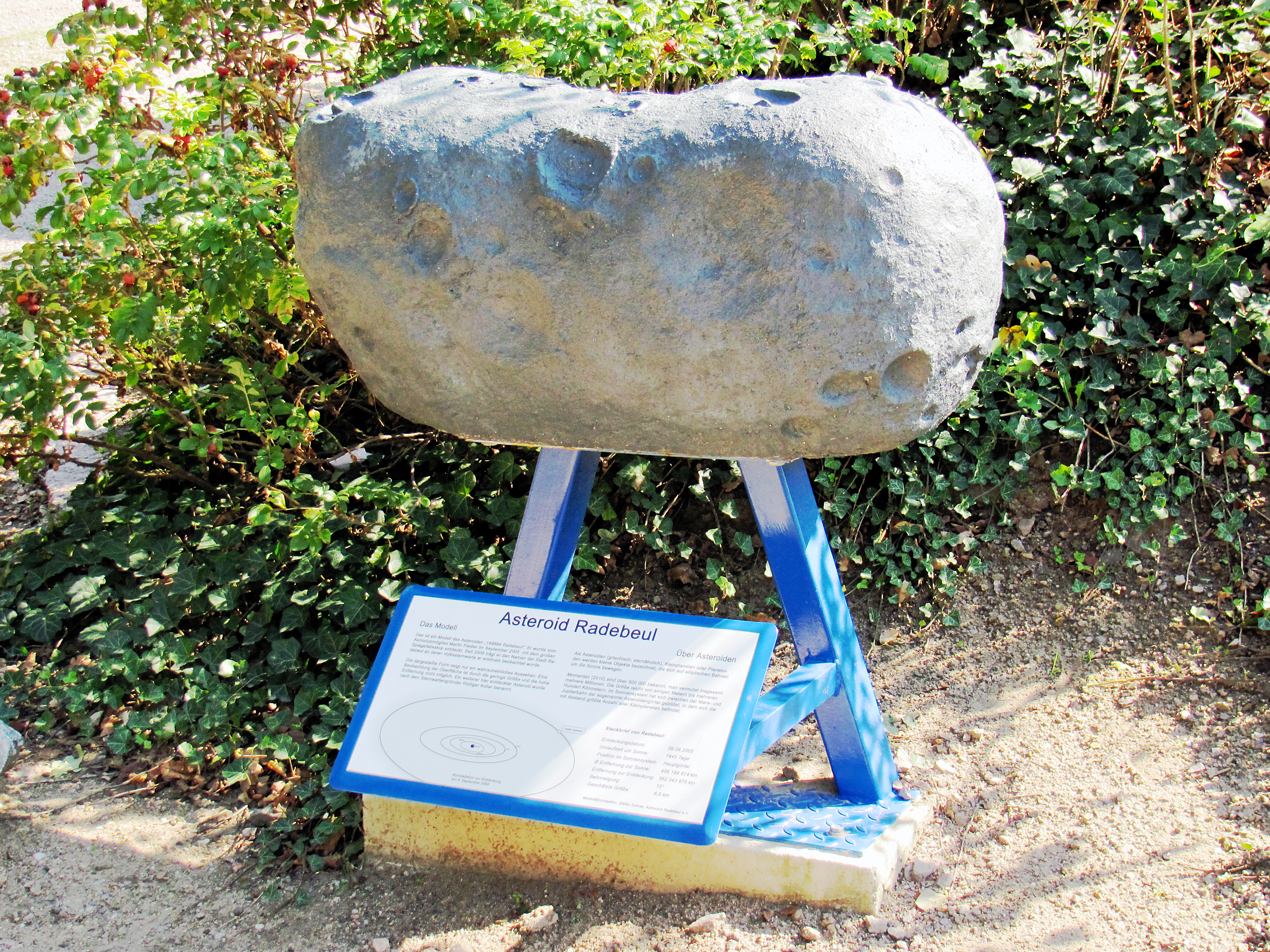 Radebeul, Sternwarte Radebeul, Modell des Asteroids (149884) Radebeul